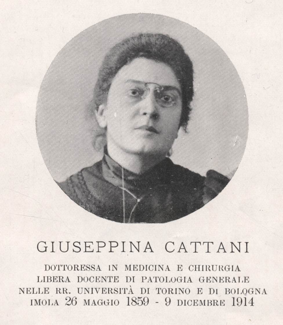 Ritratto della dottoressa Giuseppina Cattani